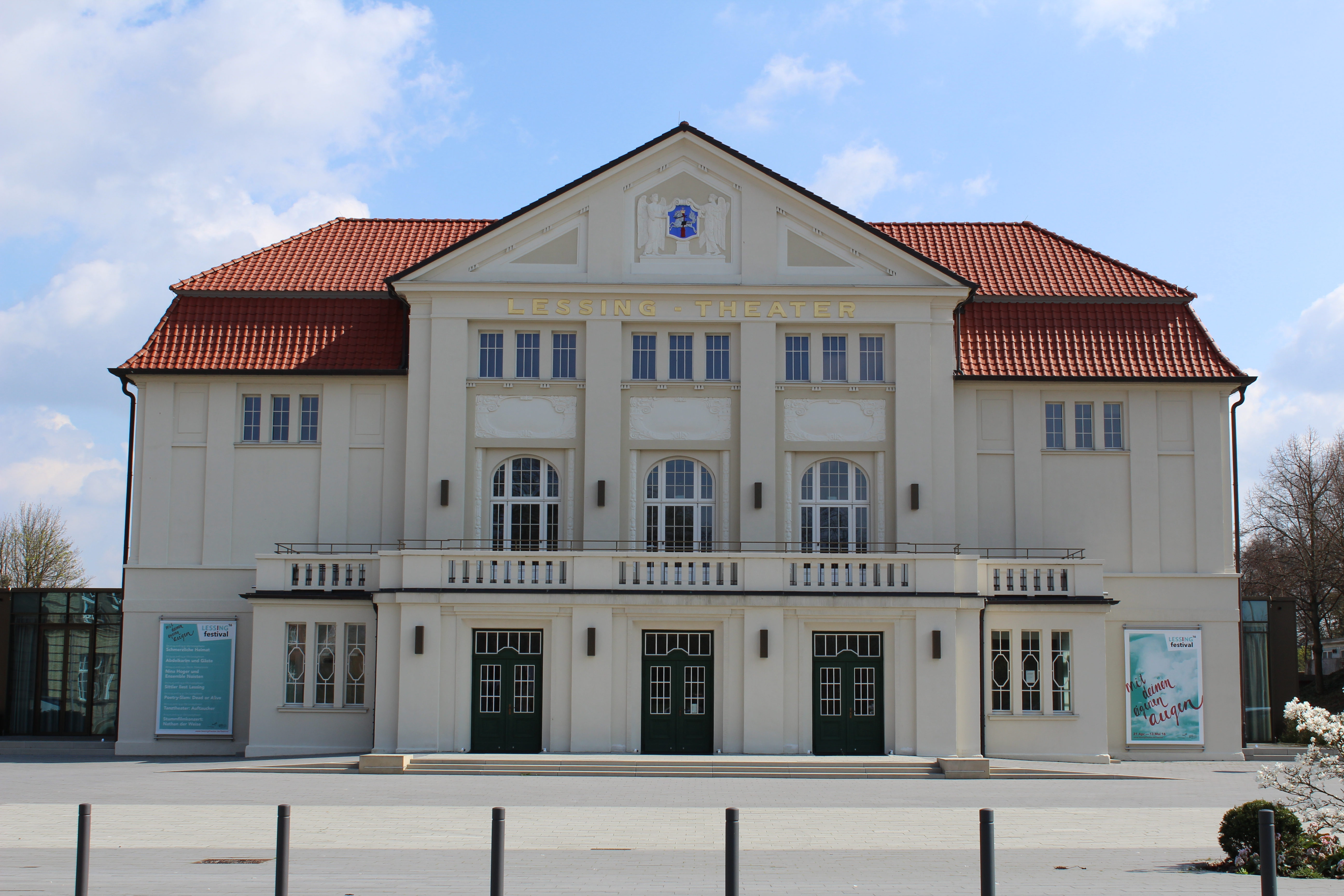 Das Lessingtheater Wolfenbüttel (Ansicht 2016)